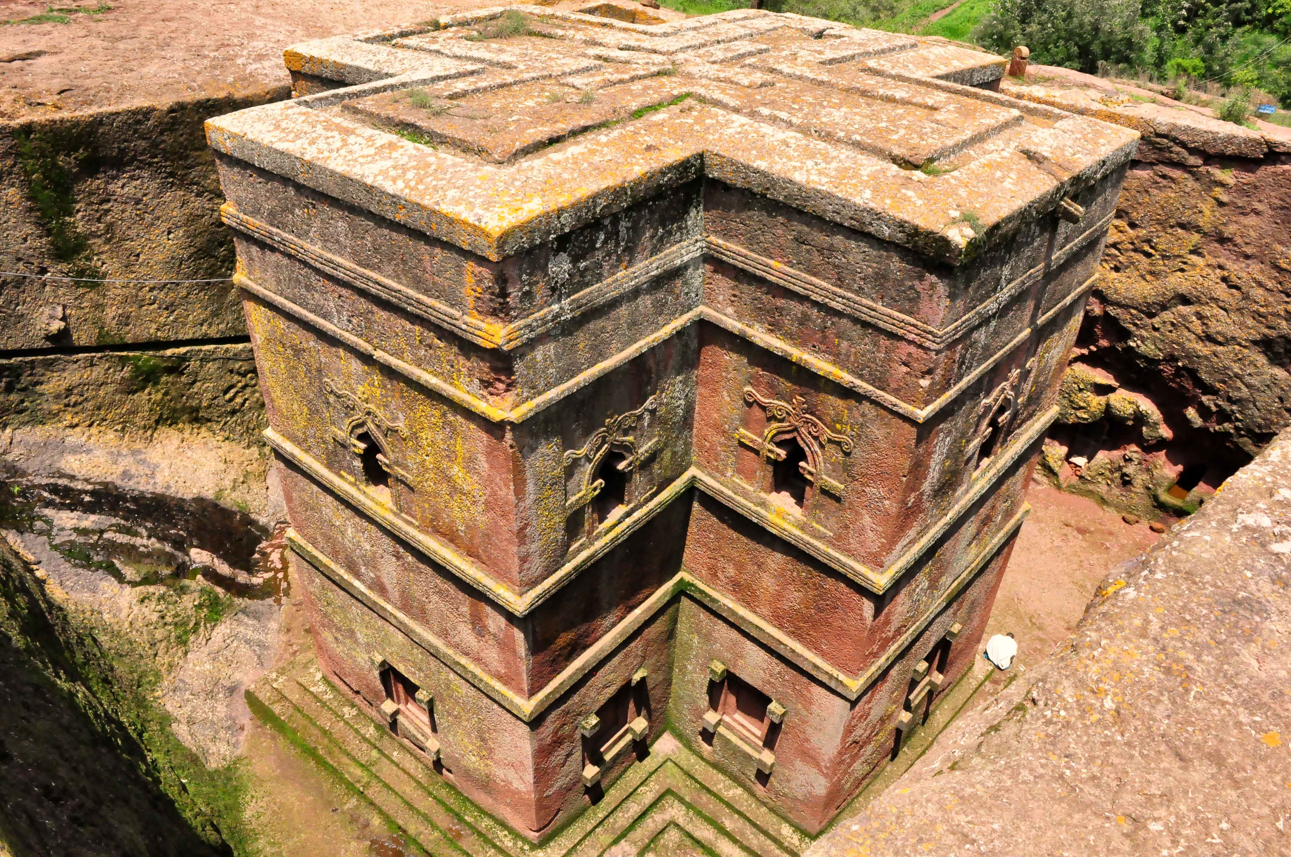 Ethiopia